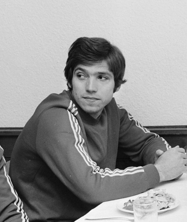 Bulgaars elftal in Kamen voor WK 74; Bonev